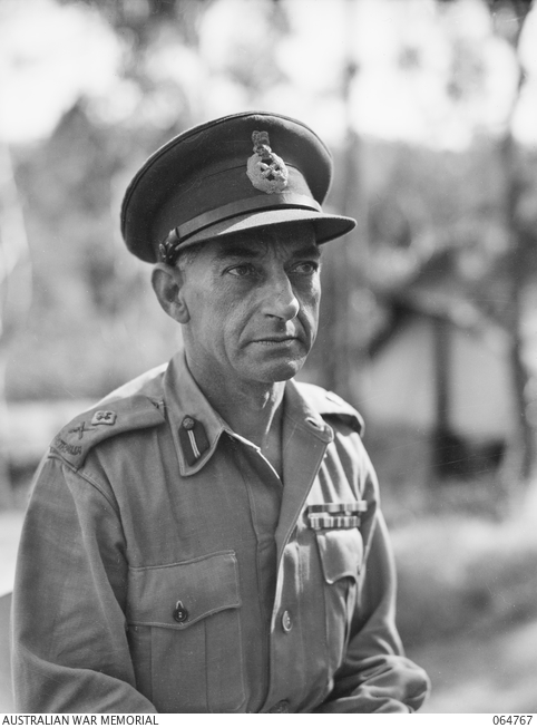 WONDECLA, QUEENSLAND, AUSTRALIA. 1944-03-06. VX17 MAJOR-GENERAL J.E.S. STEVENS, DSO., ED., GENERAL OFFICER COMMANDING, 6TH DIVISION.